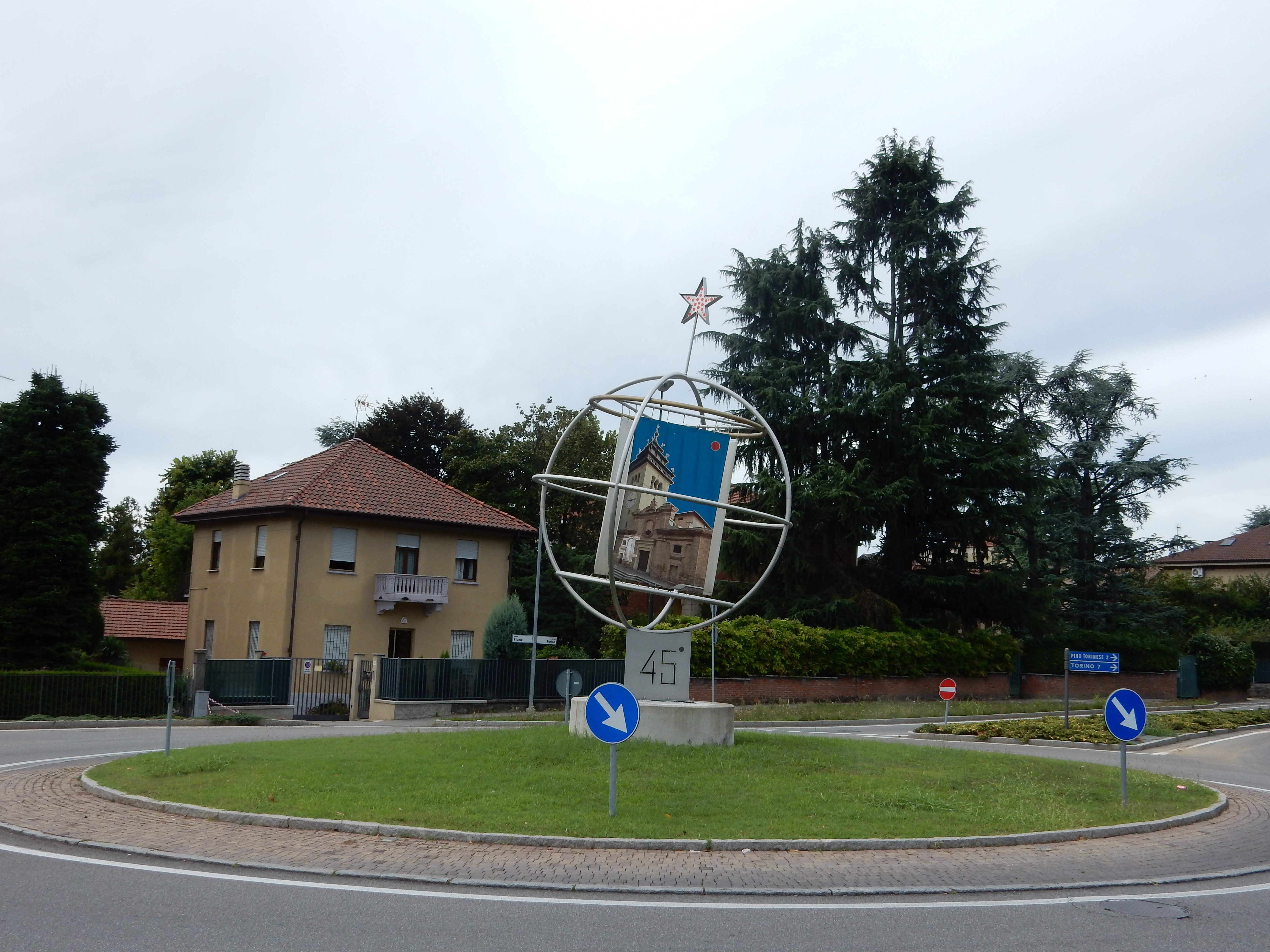 Rotonda celebrante il 45° parallelo